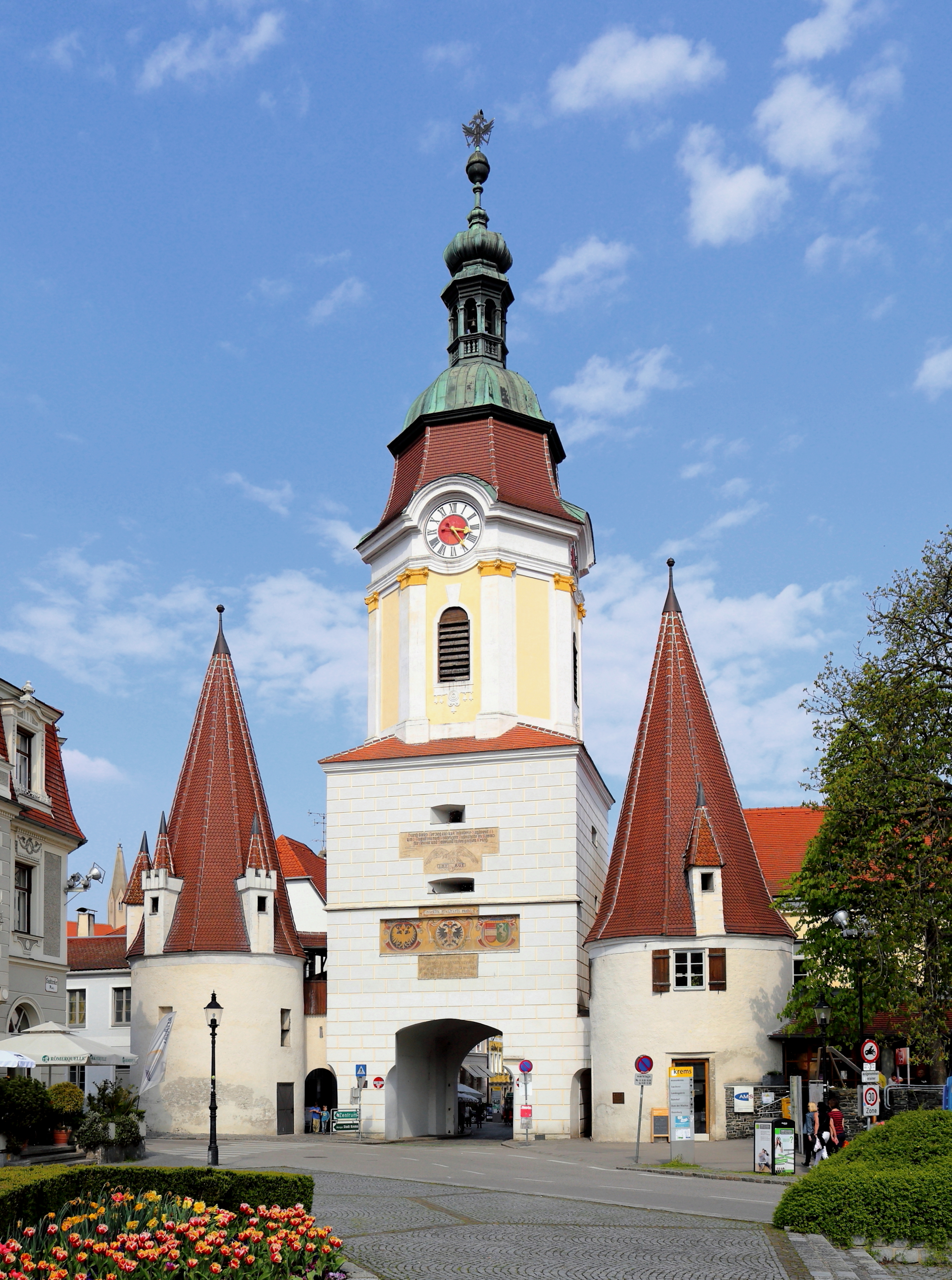 Das Steiner Tor in der niederösterreichischen Bezirkshauptstadt Krems an der Donau.Das einzige erhaltene von den ehemals 4 Stadttoren ist das Wahrzeichen der Stadt und war früher Teil der Stadtmauer, die mittlerweile abgetragen ist. Das untere Stockwerk des mächtigen Rechteckturmes sowie die flankierenden Trabantentürme stammen aus dem Ende des 15. Jahrhunderts. Der barocke Turmaufbau erfolgte in der Regierungszeit Maria Theresias (um 1750).